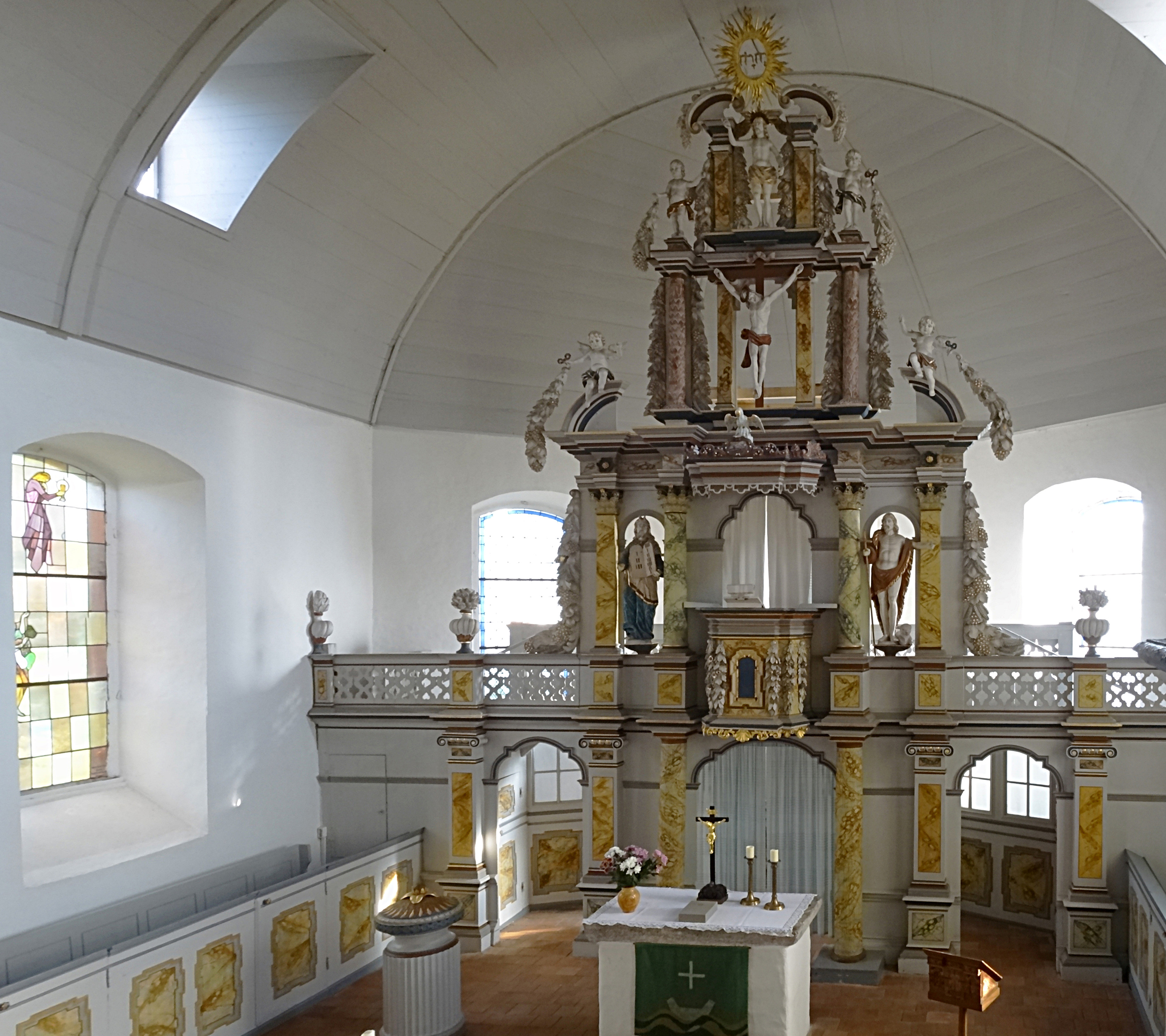 barocker Kanzelaltar in St. Georg Mellingen